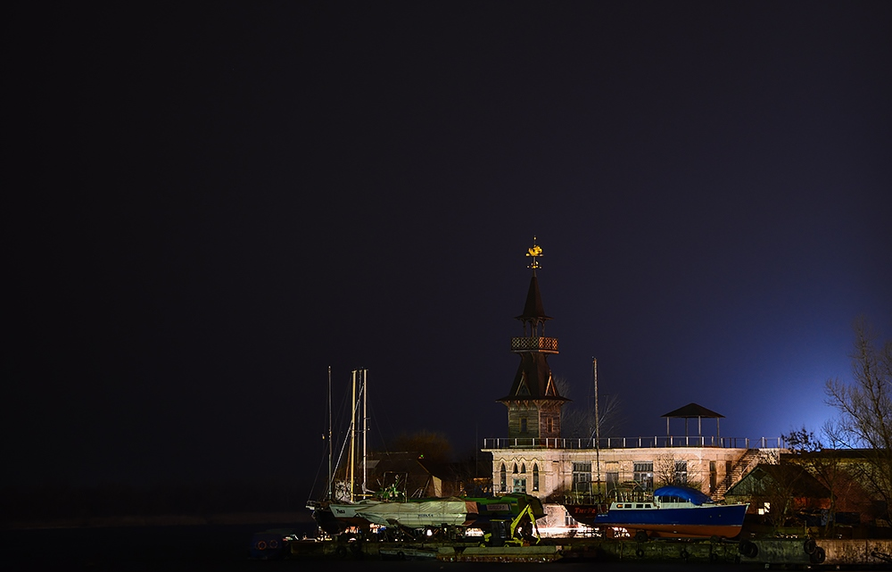 Ночной вид на херсонский яхт-клуб